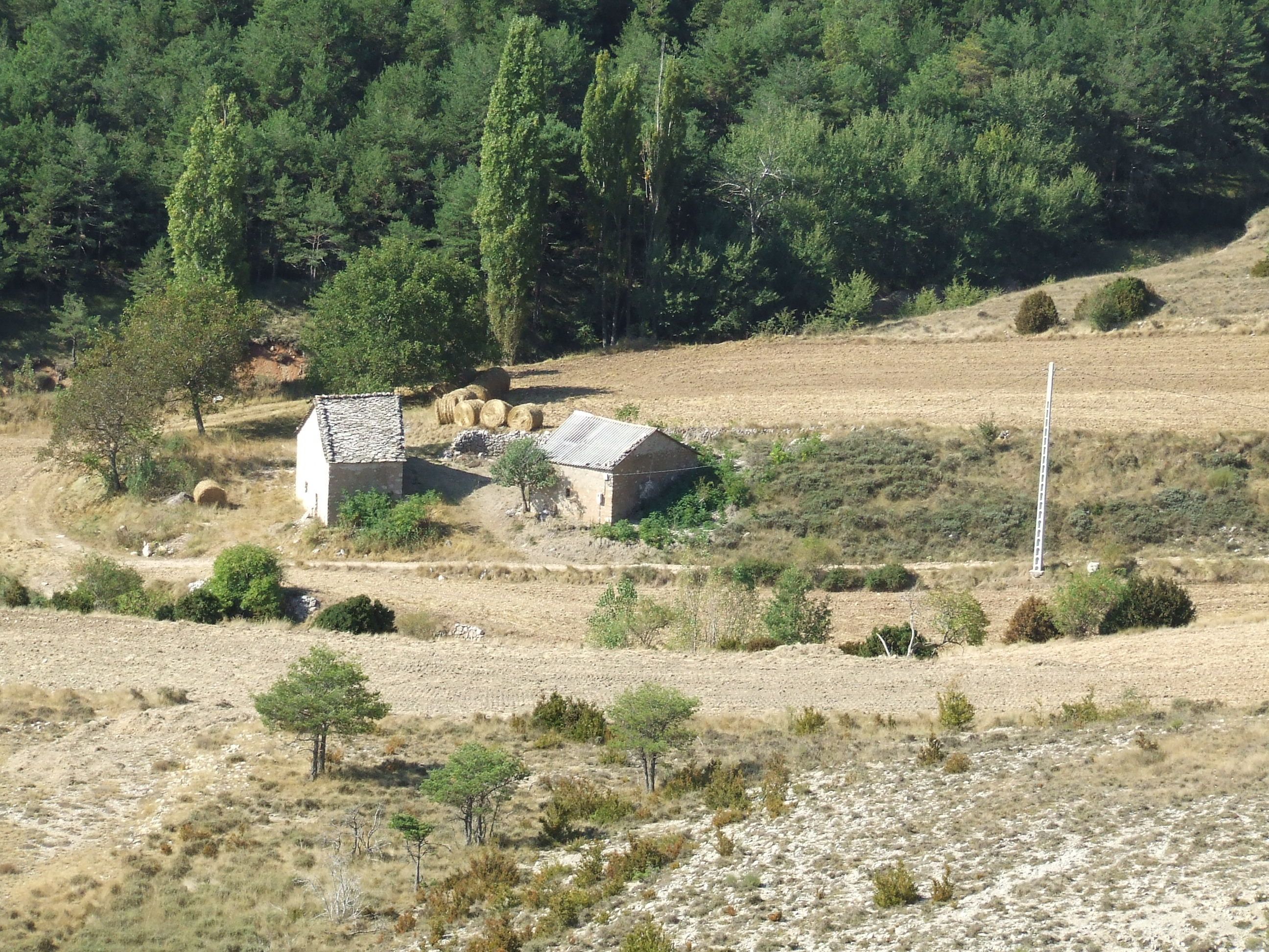 Cal Pletes (Bóixols, Abella de la Conca, Pallars Jussà)